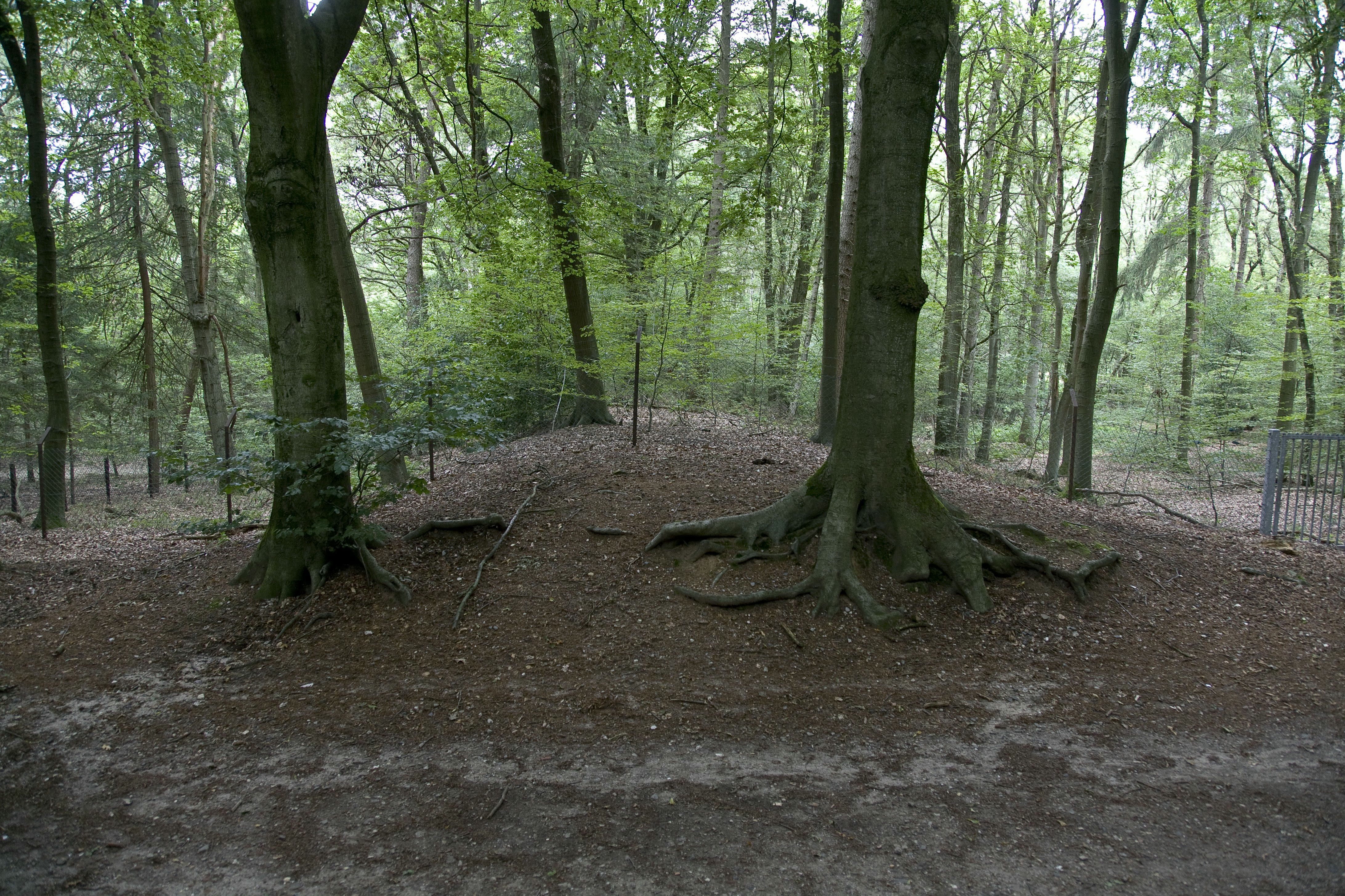 Swartendijk, een aarden dam en deel van Romeins aquaduct (opmerking: Publicatie TRAP route Berg en Dal) This is a possible Rijksmonument: Find the monument in the Monuments database: in Unknown All Rijksmonumenten in Unknown Is this a Rijksmonument? Yes No More information about this project and help. More images to work at in Category:Possible Rijksmonumenten.